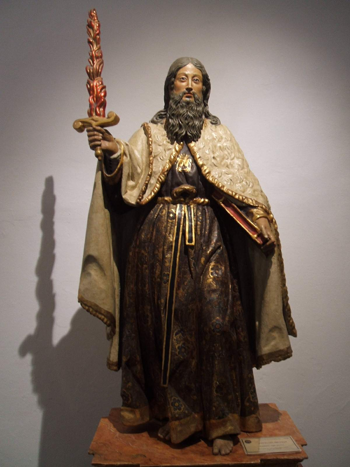 Museo y Oratorio de San Juan de la Cruz, habilitado en el Convento de San Miguel de los Carmelitas Descalzos de Úbeda (Jaén)